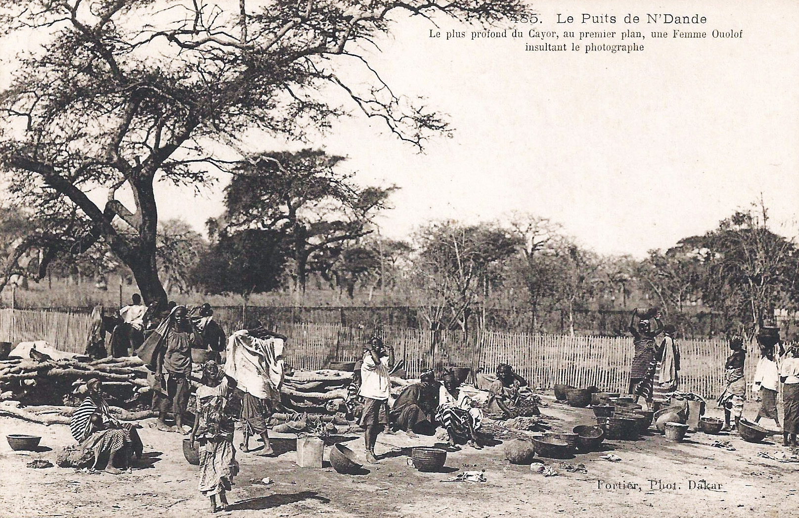 François-Edmond Fortier, Sénégal. Le puits de N'Dande, le plus profond du Cayor. Afrique Occidentale - Sénégal.